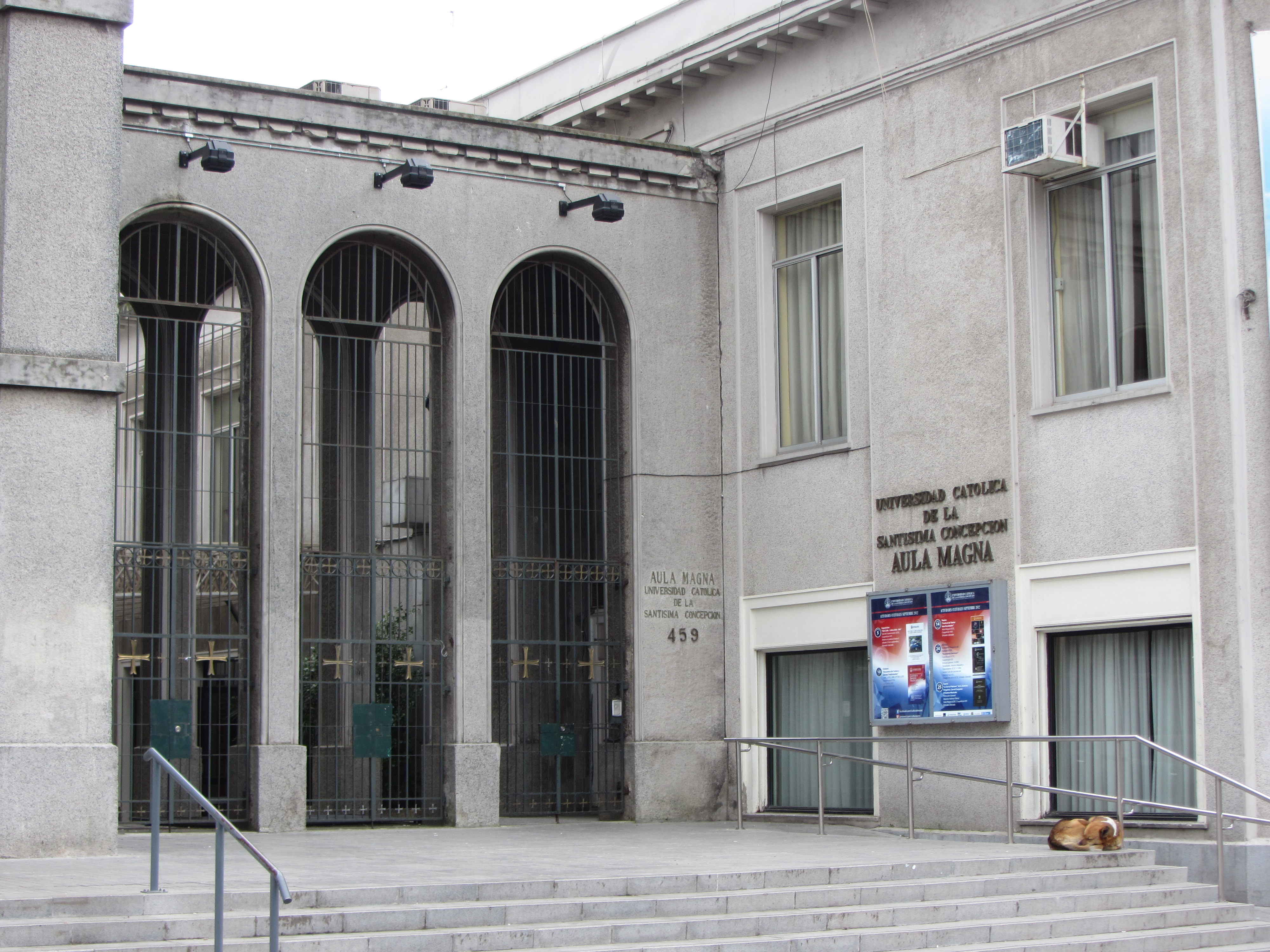 Sala de espectáculos Aula Magna Concepción, Chile Septiembre de 2012